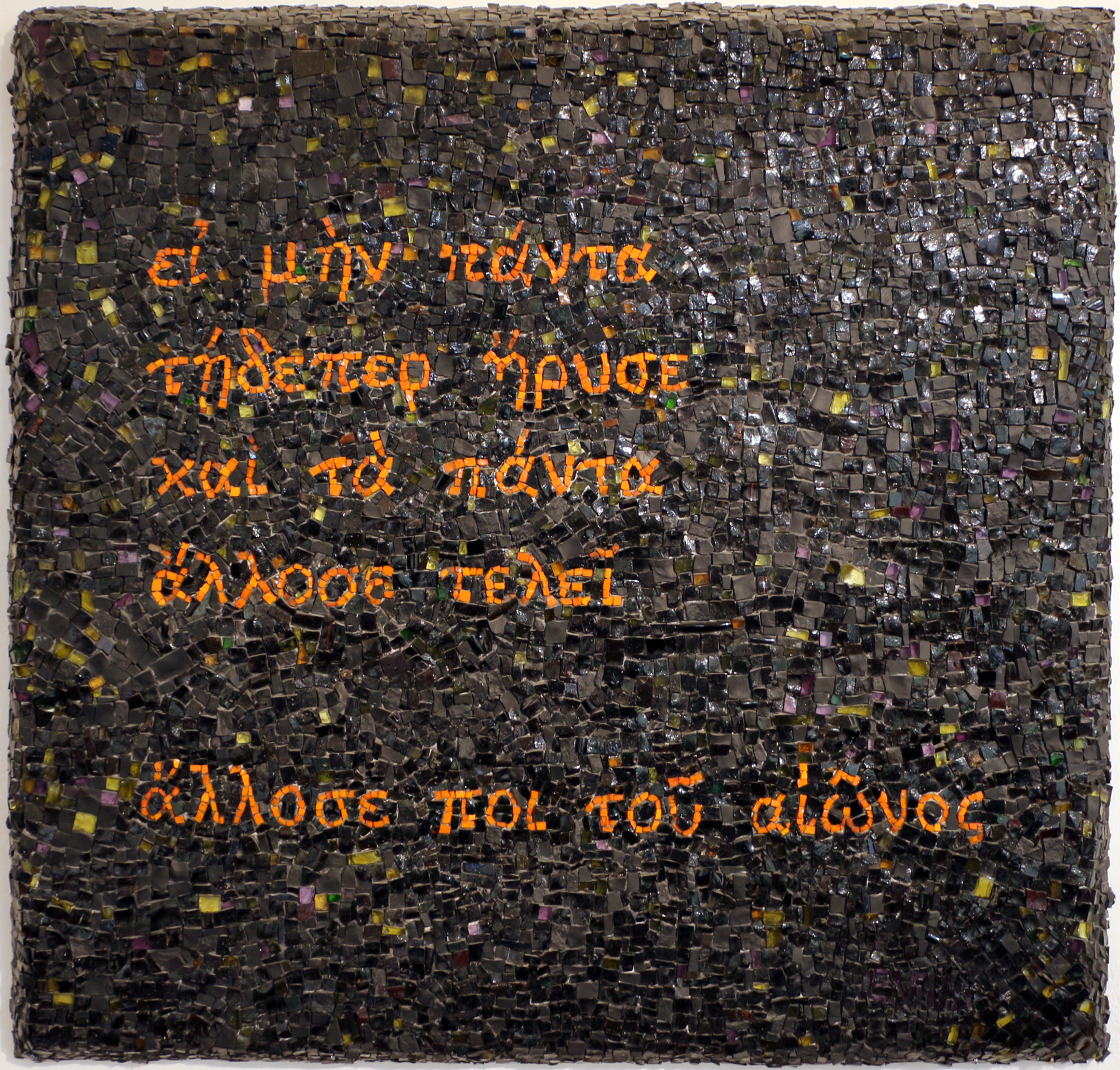 Collezione Mosaici Moderni - NB: Museum explicitly authorized the upload of its contemporary art collection for WLM 2016 (for further info ask WLM Italy organizators). This is a photo of a monument which is part of cultural heritage of Italy.